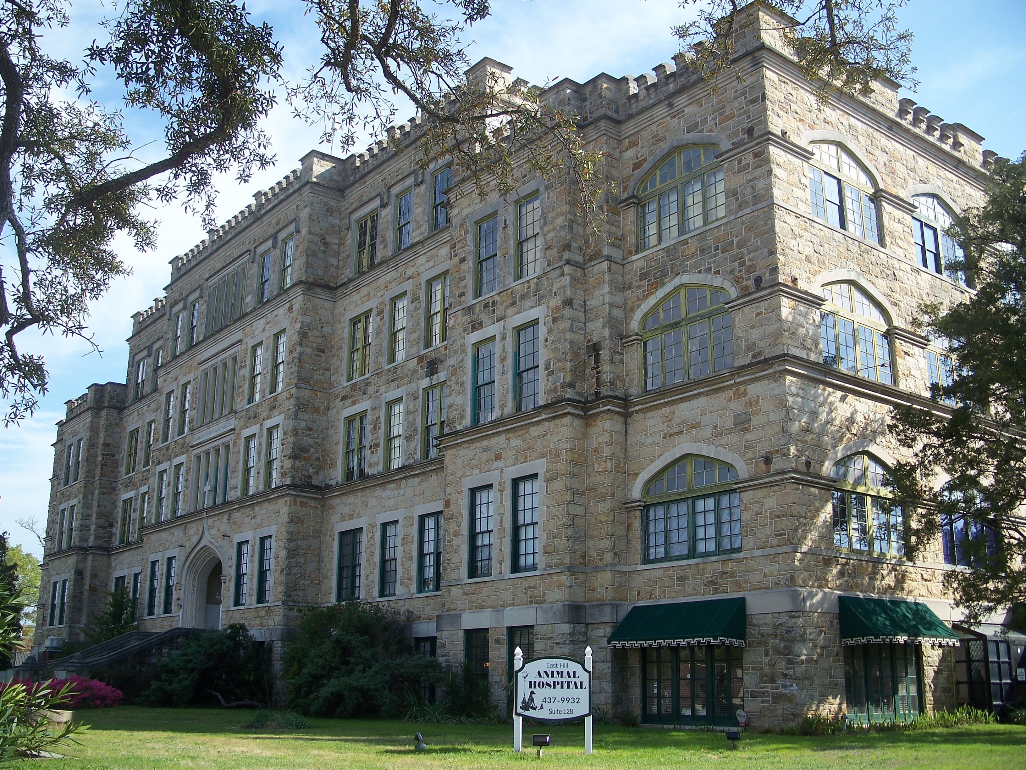 Pensacola, Florida: Pensacola Hospital.